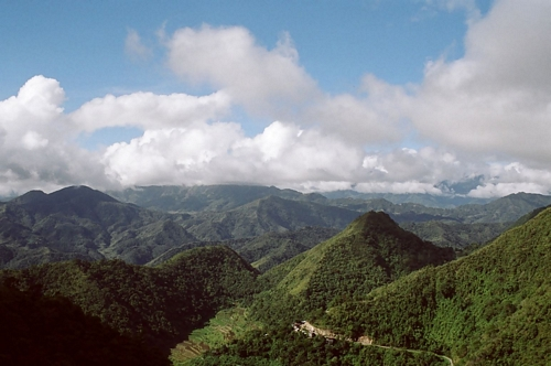 Cordillera Central (Luzon), Philippines